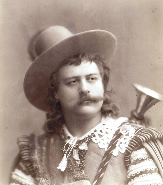 Theodor Reichmann (1849–1903) als "Trompeter von Säckingen"